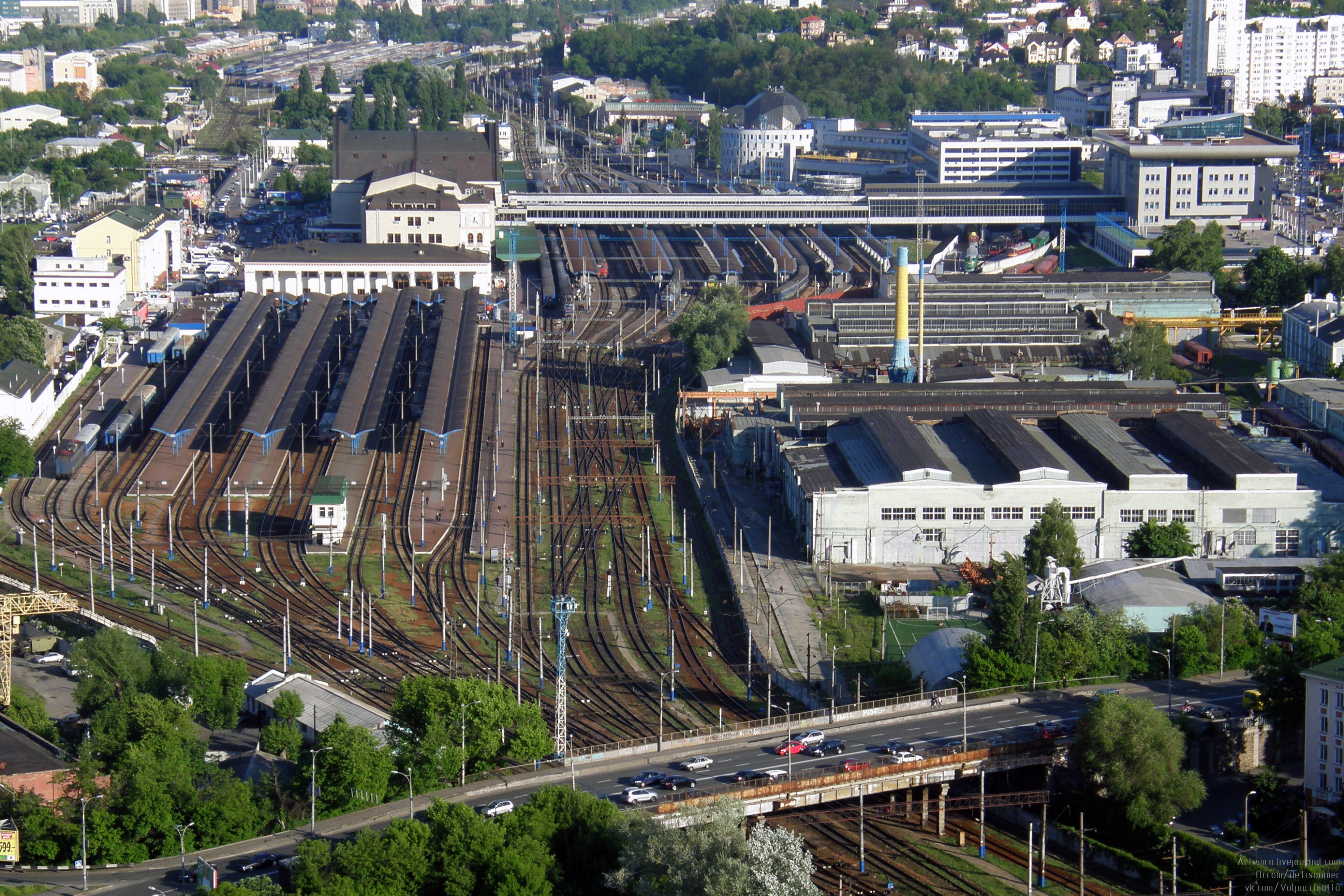 Киев-Пассажирский